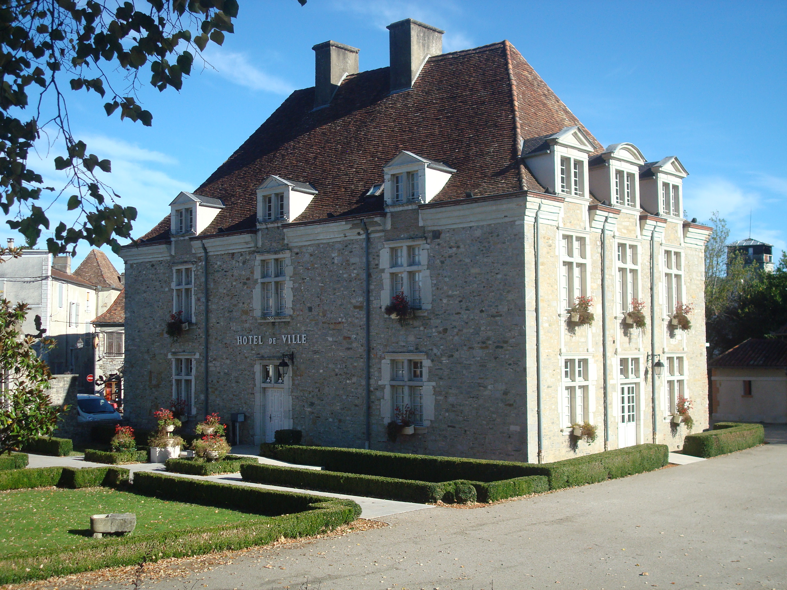 Mairie de Sauveterre-de-Béarn